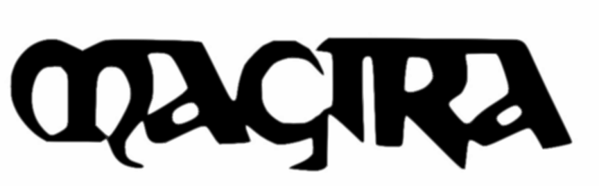 Logo des Rollenspiels Magira (Regelwerk Empires of Magira 1977)